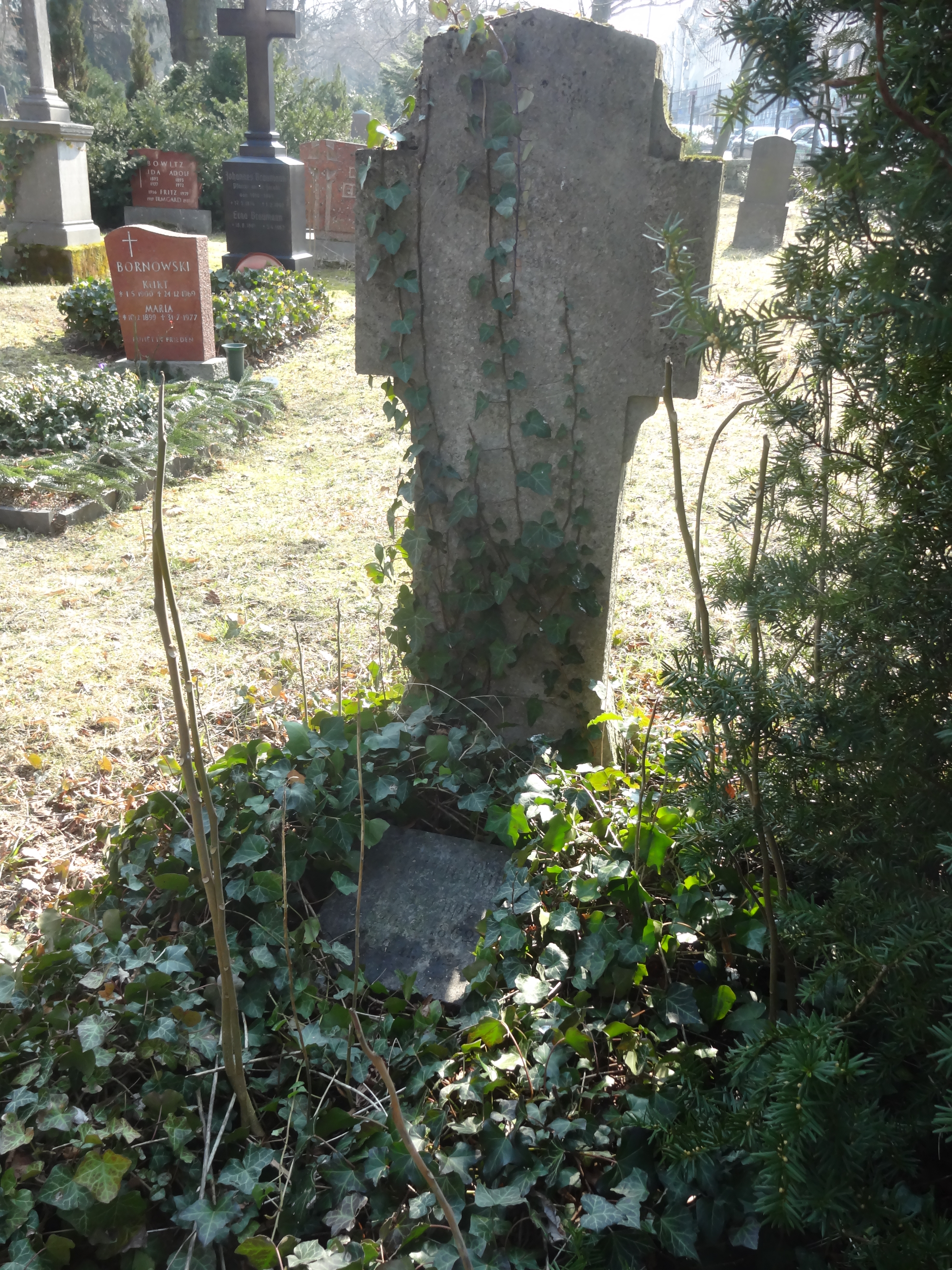 ehemaliges Ehrengrab für Johannes Bolte auf dem Alten St.-Jacobi-Friedhof in Berlin